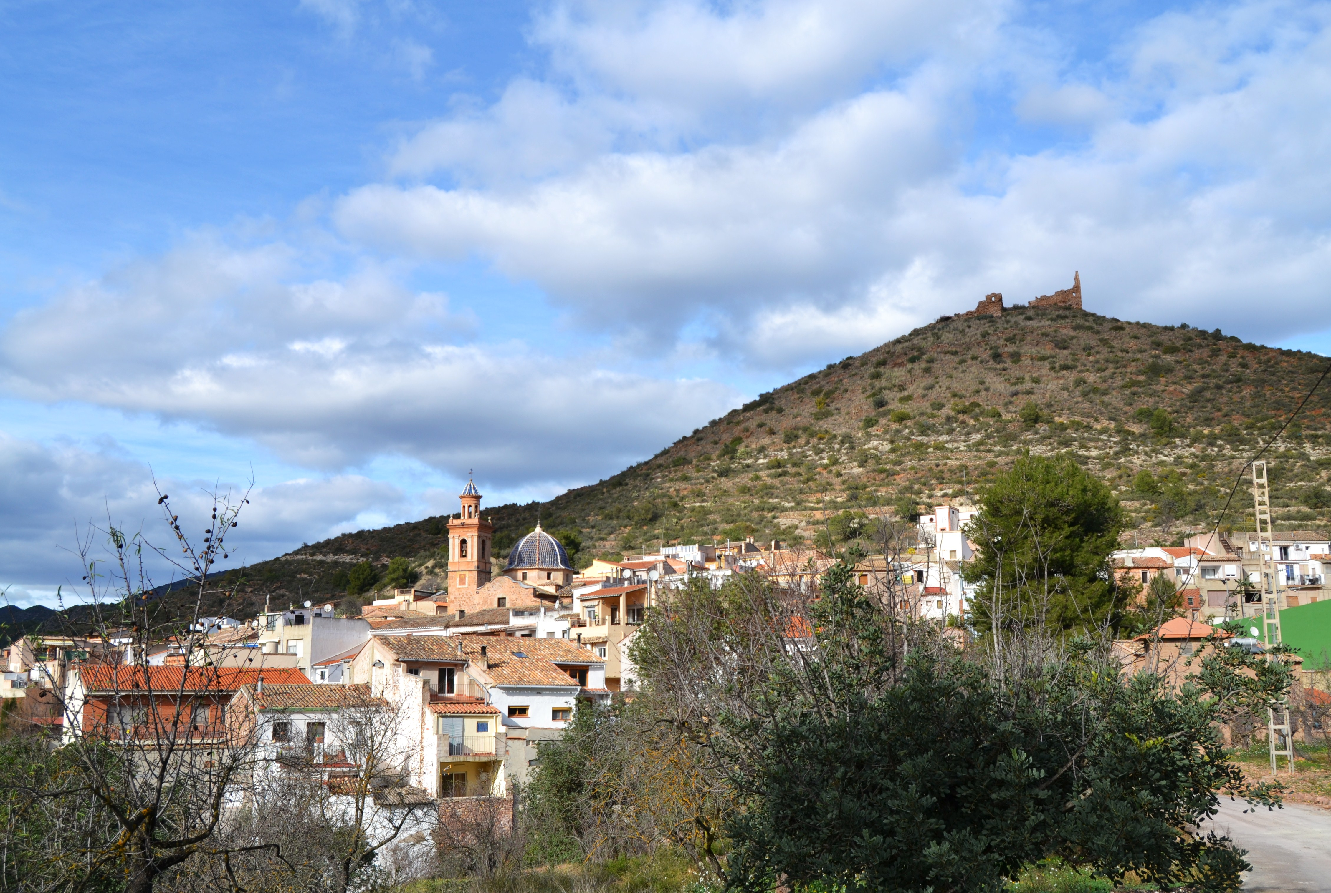 Assuévar, Alt Palància, País Valencià.